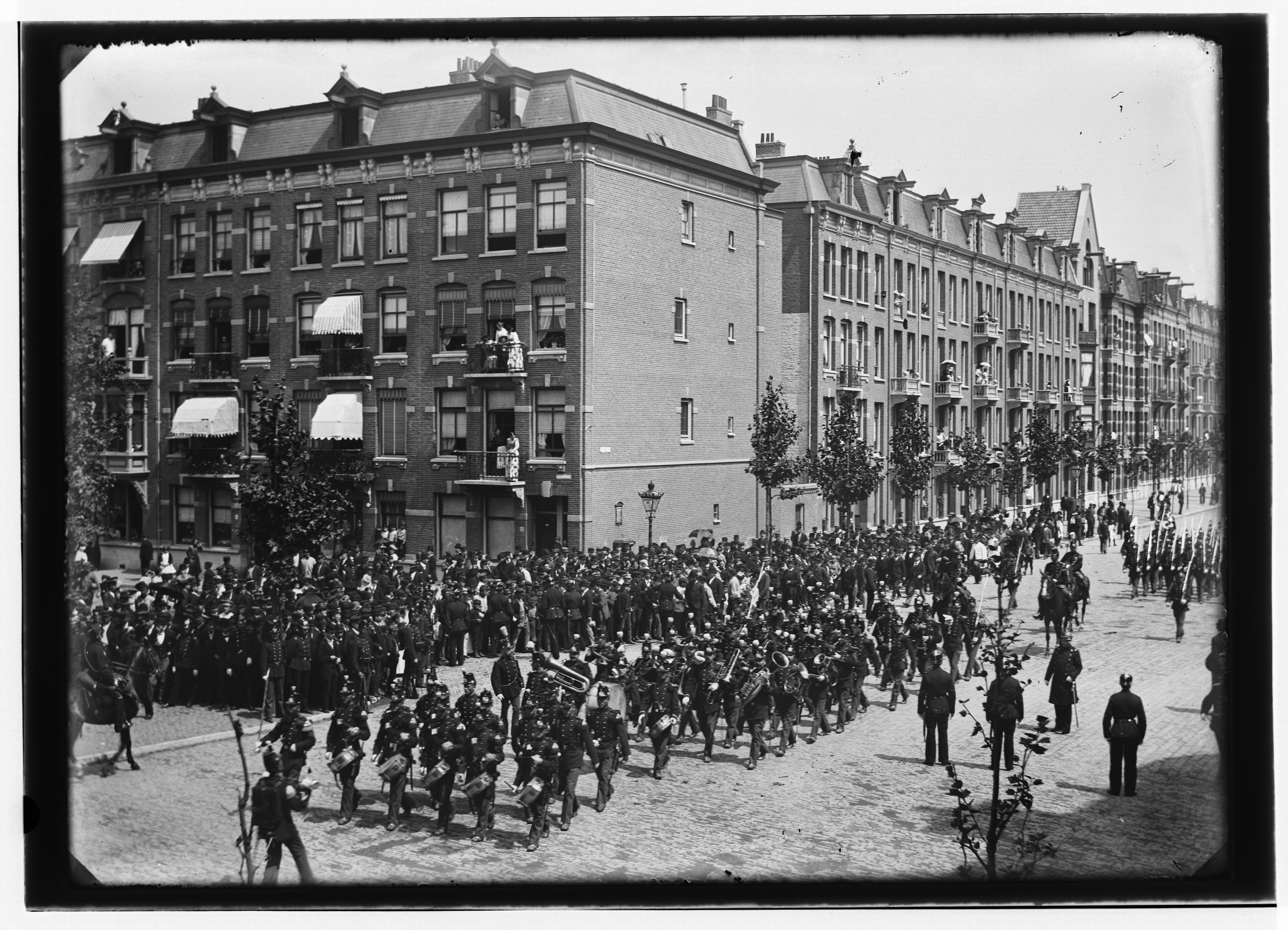 Beschrijving Ceintuurbaan 159-161-163 enz. (v.l.n.r.) Links: Sarphatipark 133-137 (v.l.n.r.)``, gezien naar Van Woustraat/Amstel tijdens een militaire parade. Documenttype foto Vervaardiger Olie``, Jacob (1834-1905) Collectie Collectie Jacob Olie Jbz. Datering 9 juli 1893 Geografische naam Ceintuurbaan Sarphatipark Inventarissen Afbeeldingsbestand 10019A000902 Generated with Dememorixer